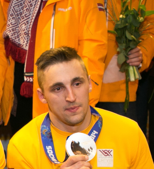 Latvijas Olimpiskās komandas sagaidīšana lidostā "Rīga"